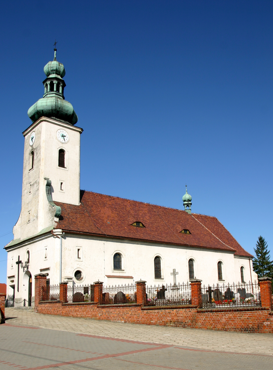 Biedrzychowice – wieś w Polsce położona w województwie opolskim, w powiecie prudnickim, w gminie Głogówek.